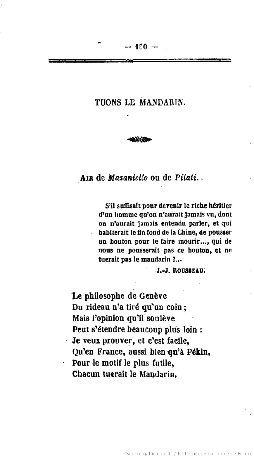 Louis Protat, Tuons le mandarin // Le Caveau, 1857, vol. 23, p,150